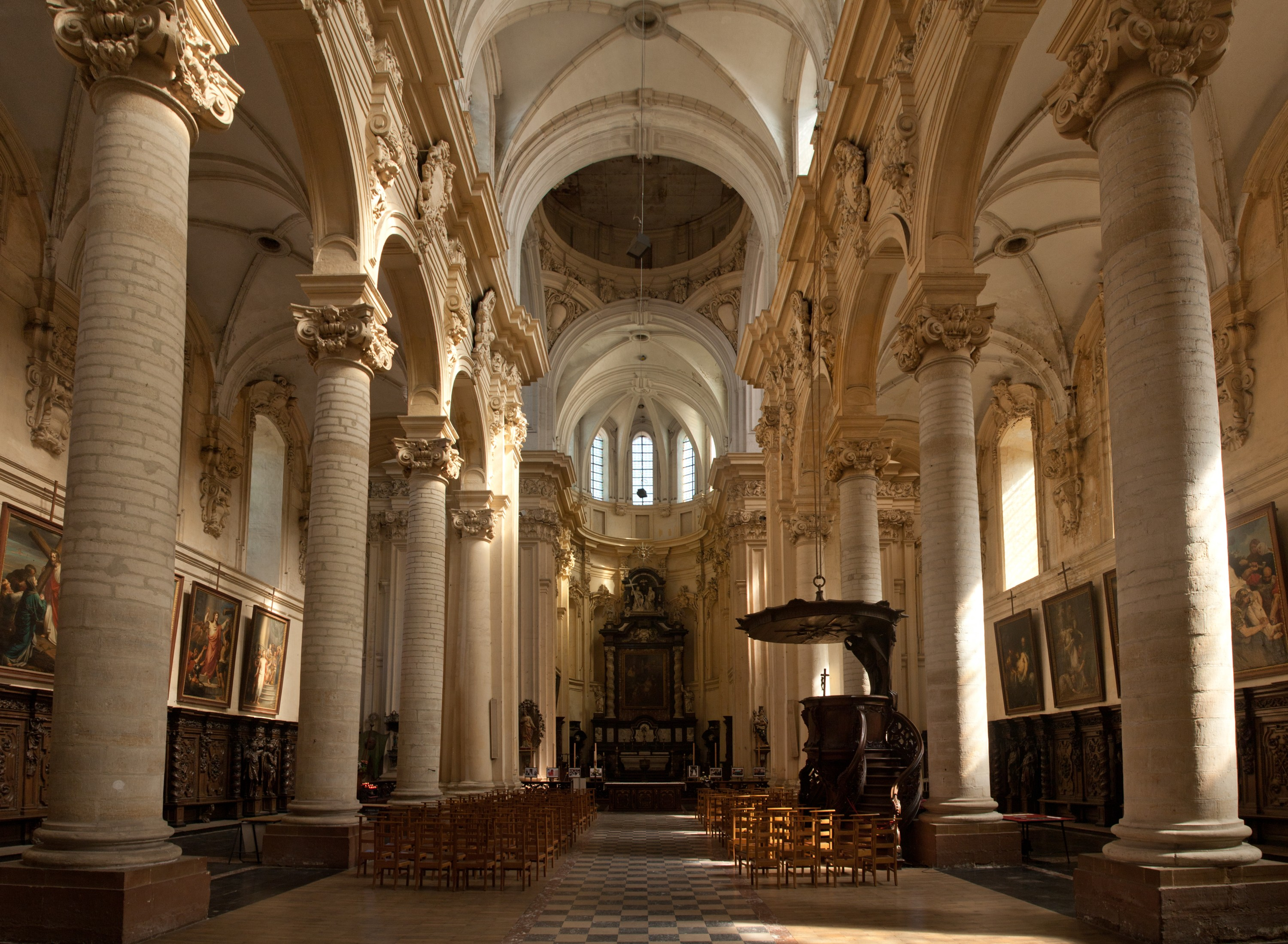 Interieur van de Sint-Michielskerk te Leuven